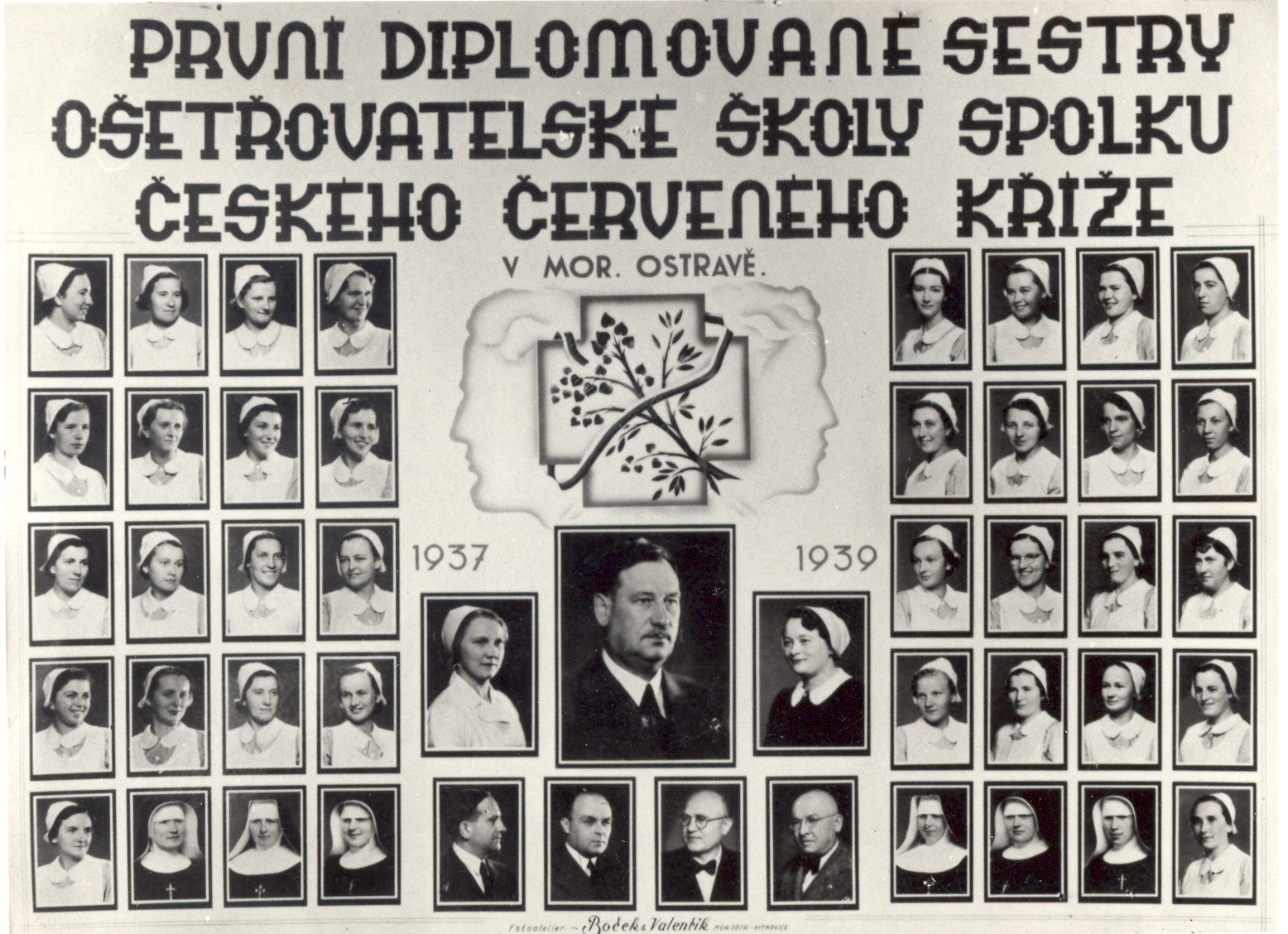 historické tablo Diplomovaných ošetřovatelek